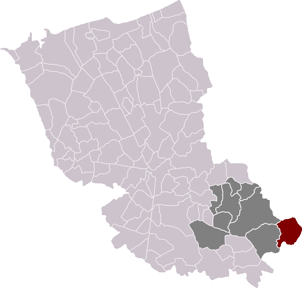 Locatie gemeente Niepkerke in arrondissement Duinkerke. Zelfgemaakt. Location of Nieppe municipality in the arrondissement of Dunkirk. Self made. Localisation de la commune de Nieppe dans l'arrondissement de Dunkerque. Fait moi-même.